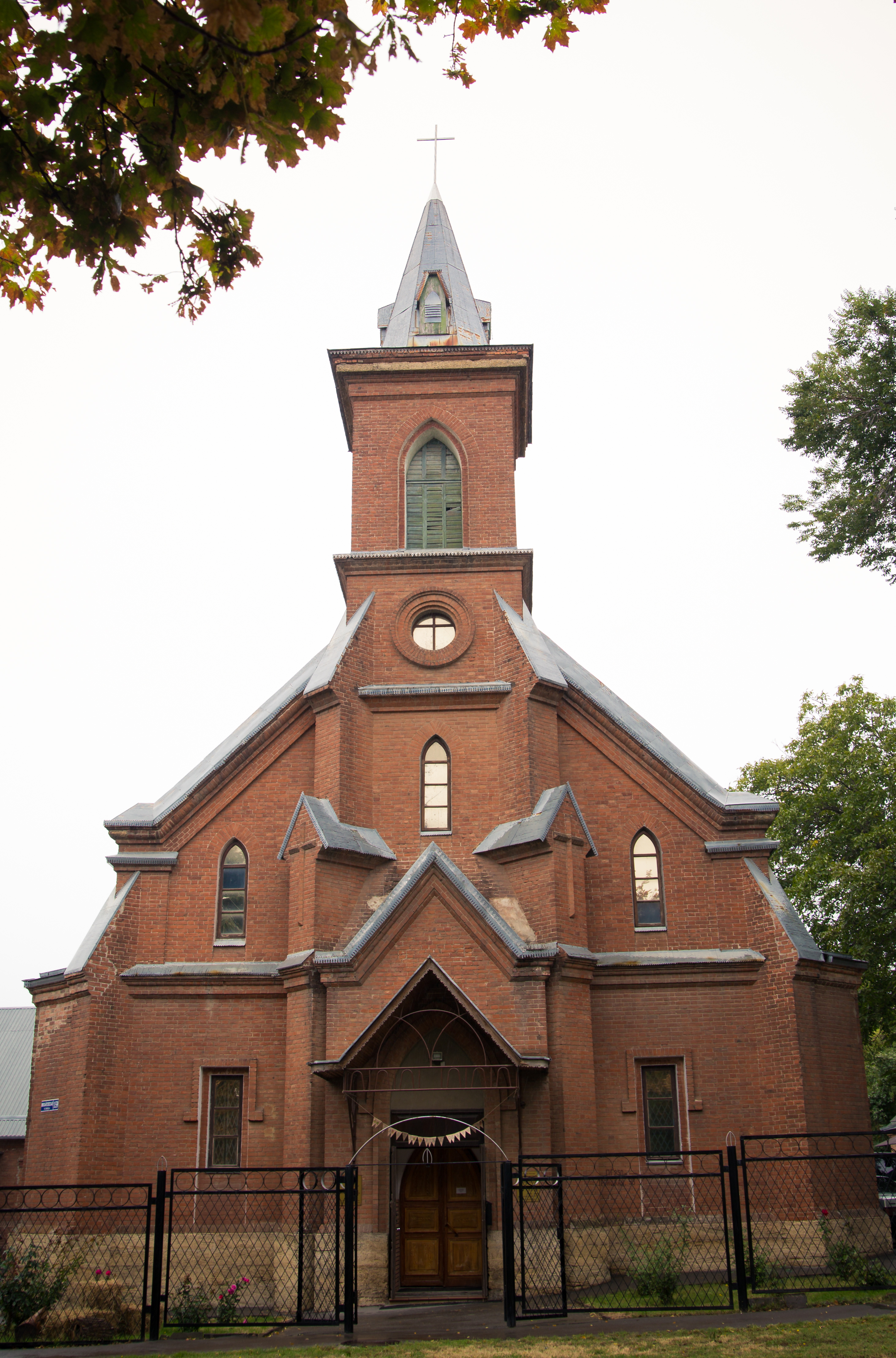 Кирха: улица Кирова, Новочеркасск, Ростовская область